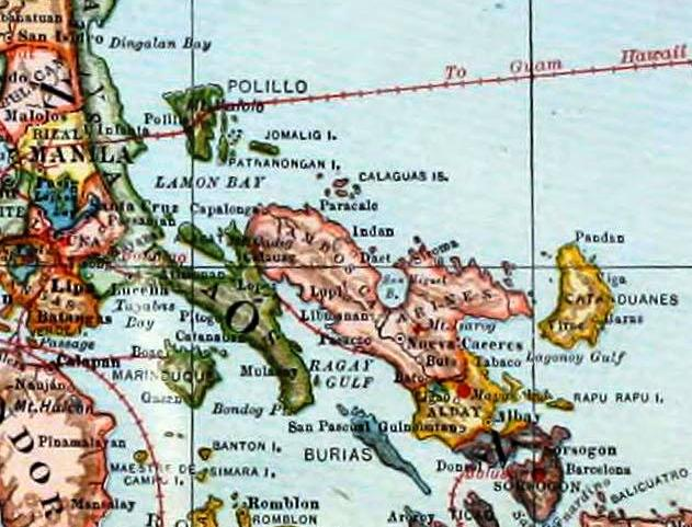 Provincia de Ambos Camarines, fragmento del Topographical and political map of the Philippines.